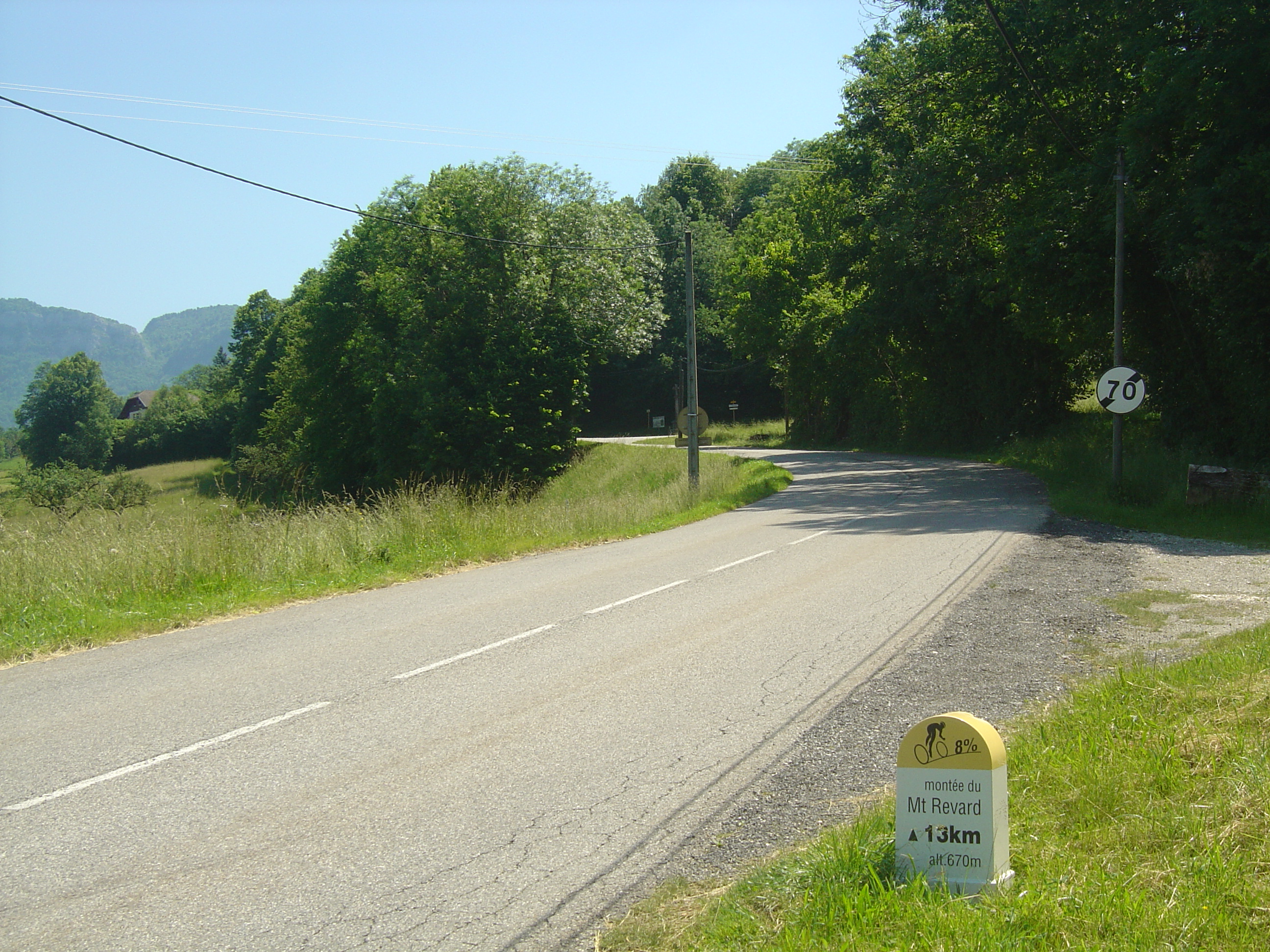 Ascension du mont Revard par le versant ouest. Pente à 8 % sur le prochain kilomètre, juste avant le hameau de Véniper